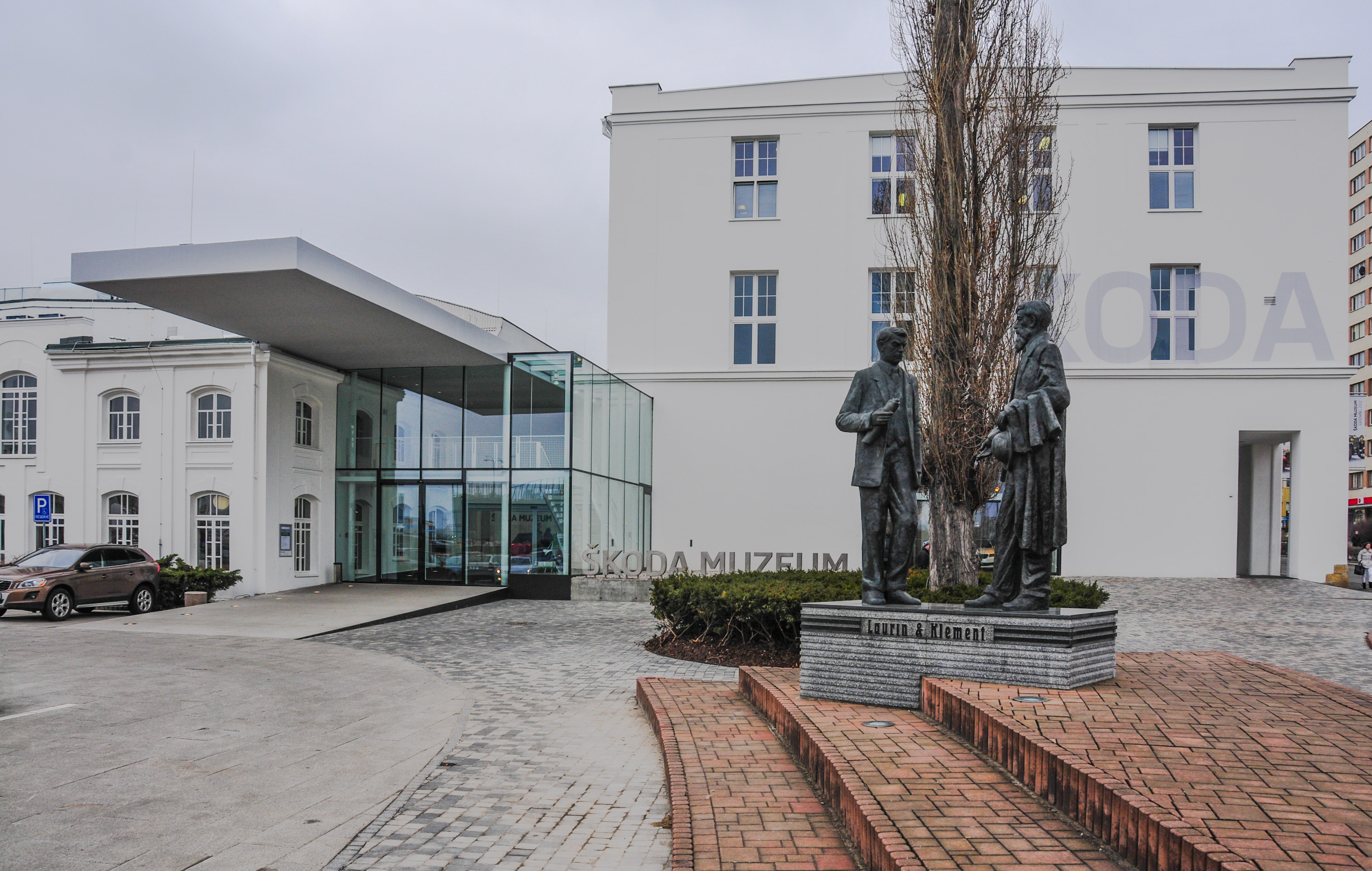 Fototermin Škoda Museum Mladá Boleslav 2013 Fototermin Škoda Muzeum 5. April 2013 in Mladá Boleslav This work is free and may be used by anyone for any purpose. If you wish to use this content, you do not need to request permission as long as you follow any licensing requirements mentioned on this page.